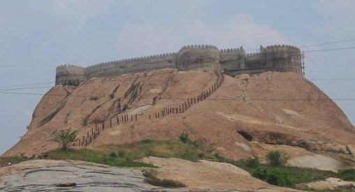 Namakkal Fort in salem